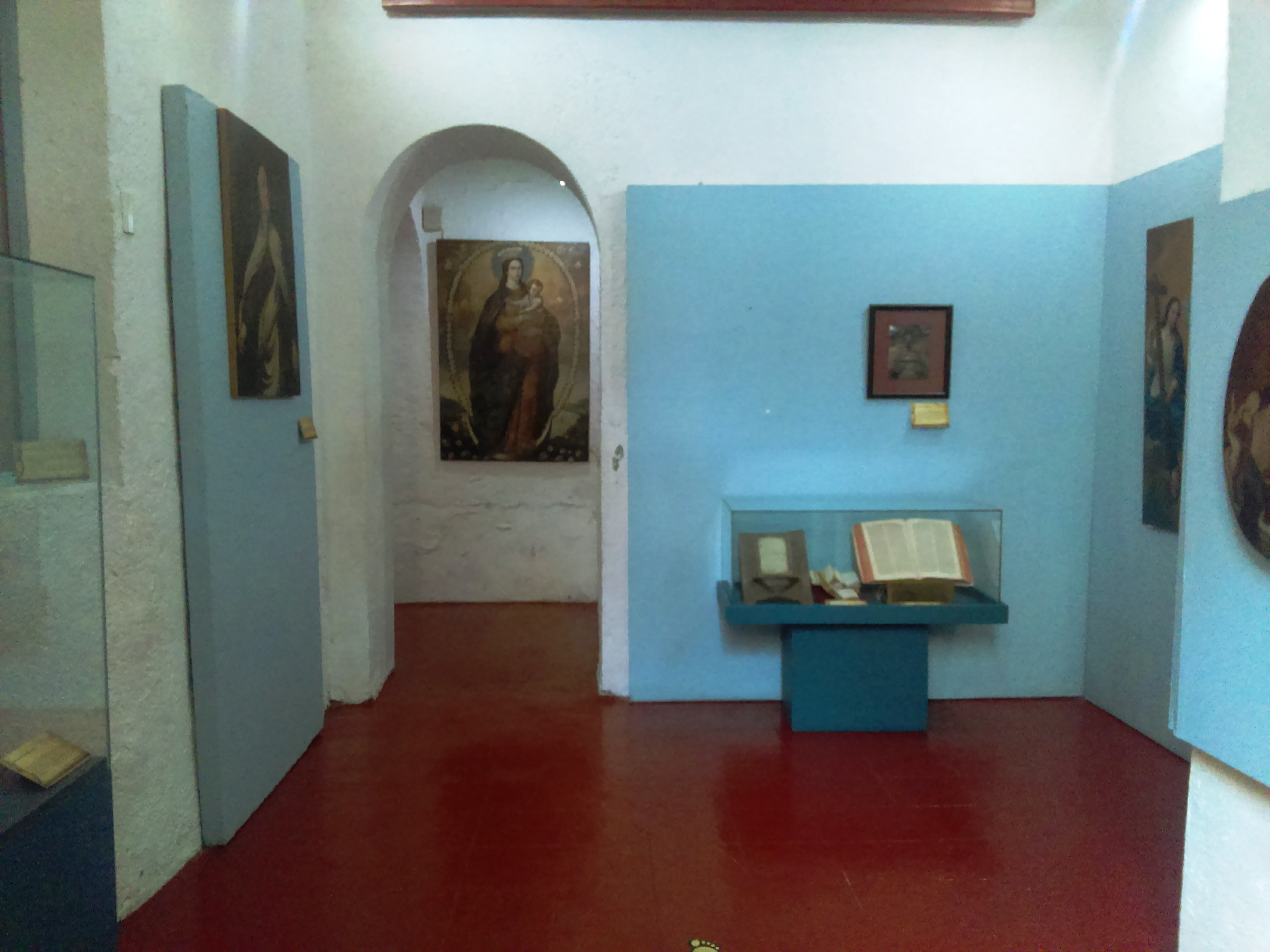 Museo de sitio de San Francisco (Pachuca).